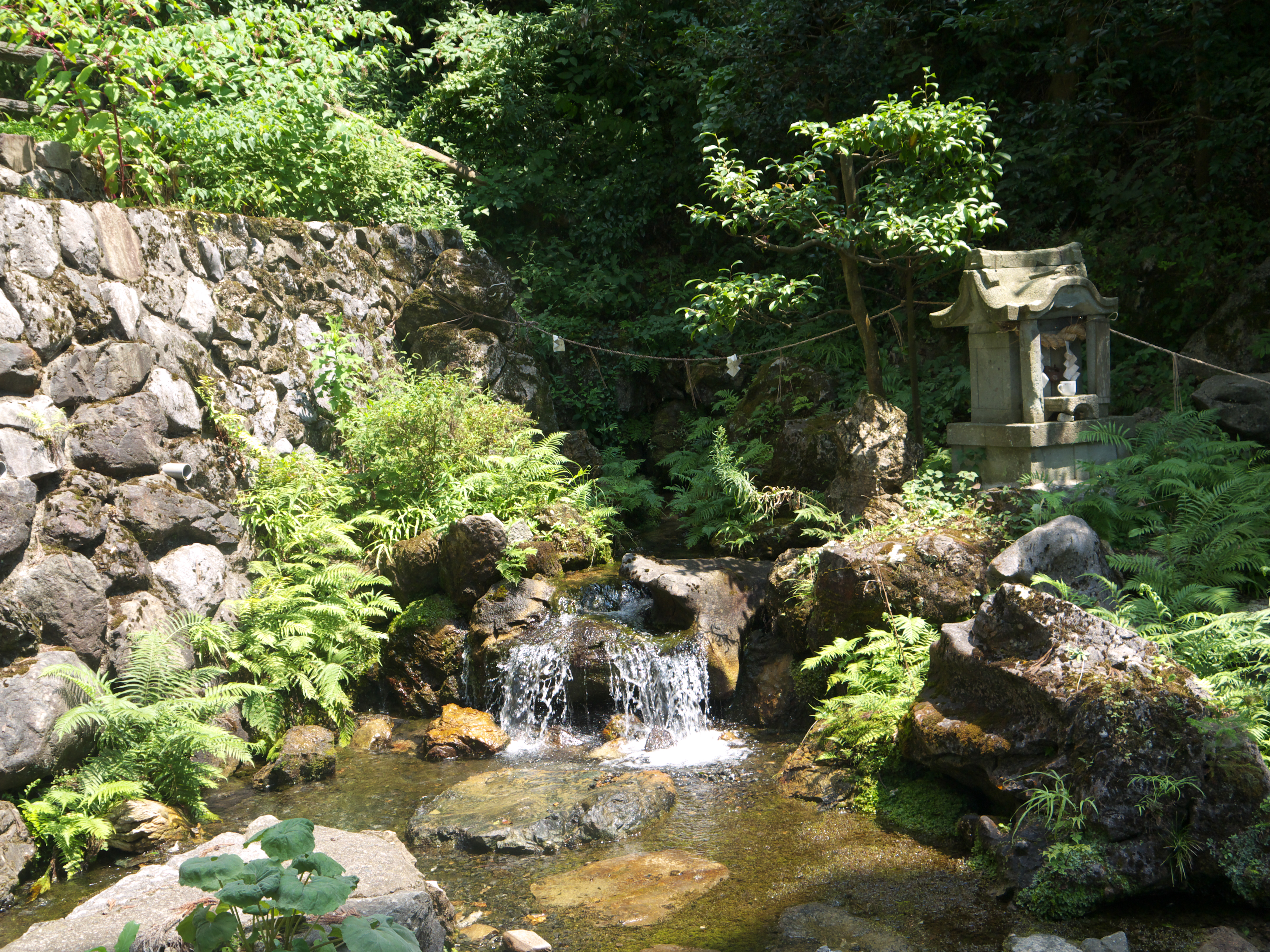 米原泉神社源泉